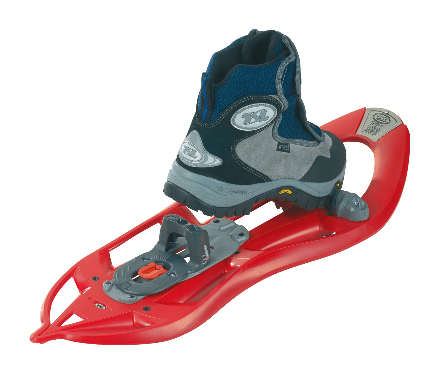 Step In Alpine